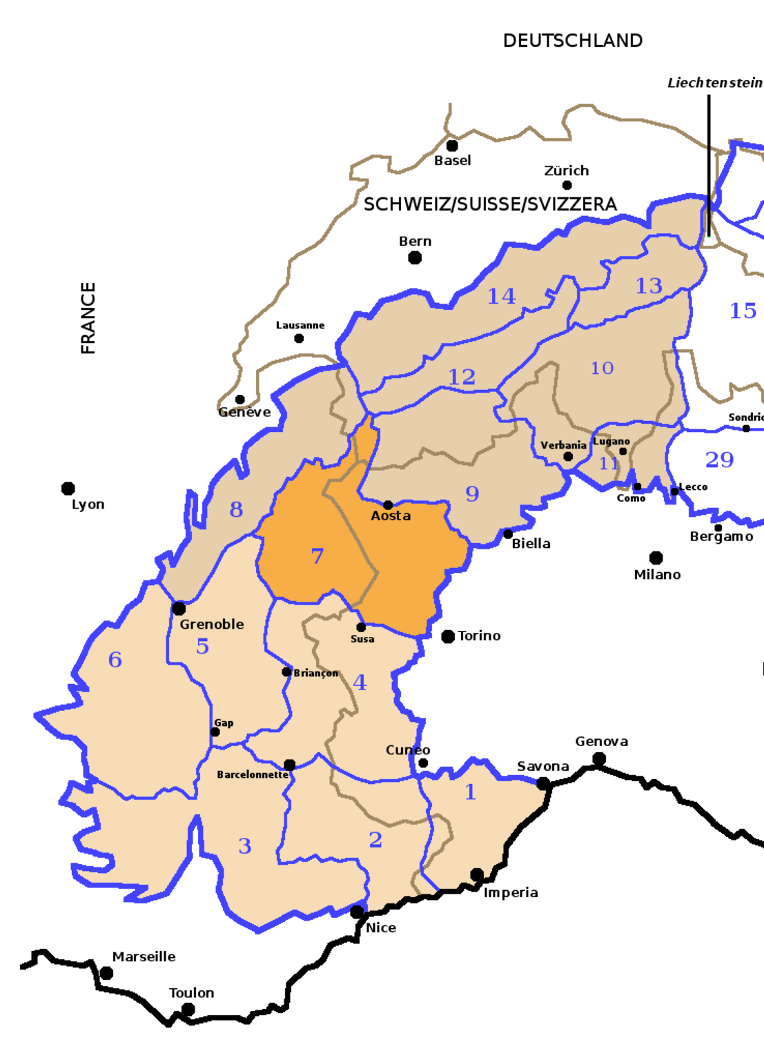 Alpi Occidentali secondo la SOIUSA con evidenziate le Alpi Graie